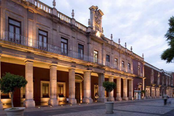 palacio del vinculo